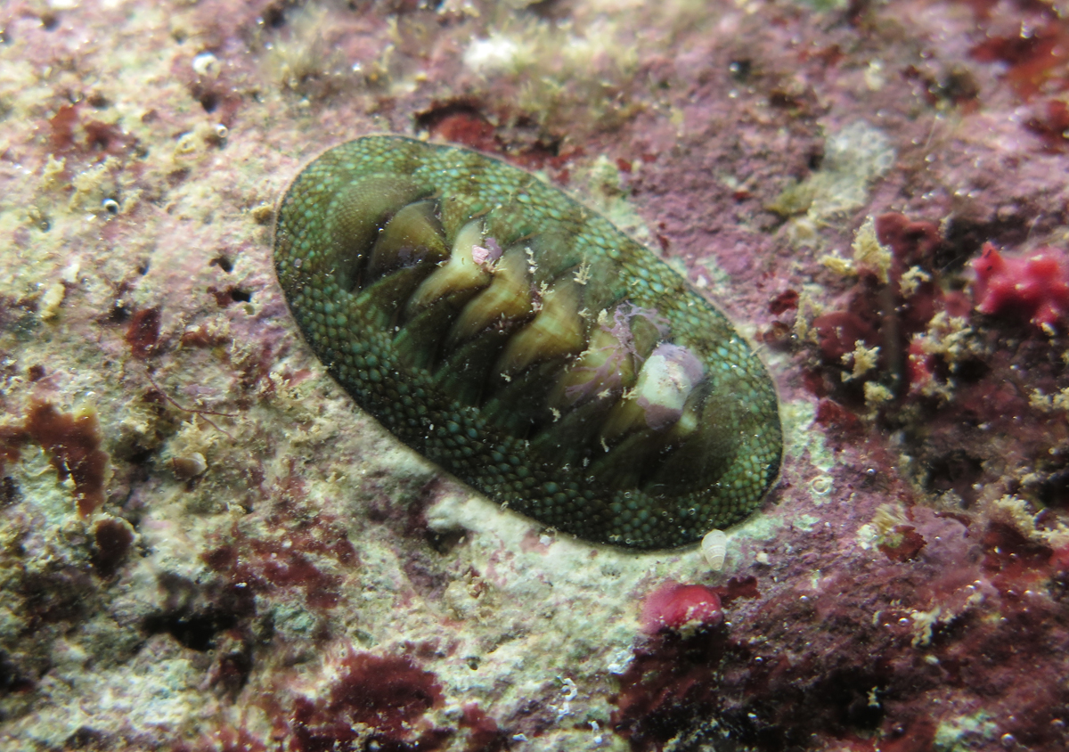 Chiton mauritianus à la Réunion.